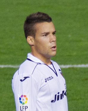 Juan Bernat, match VCF-ESP, 2012.